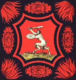 Bandiera della sqadra